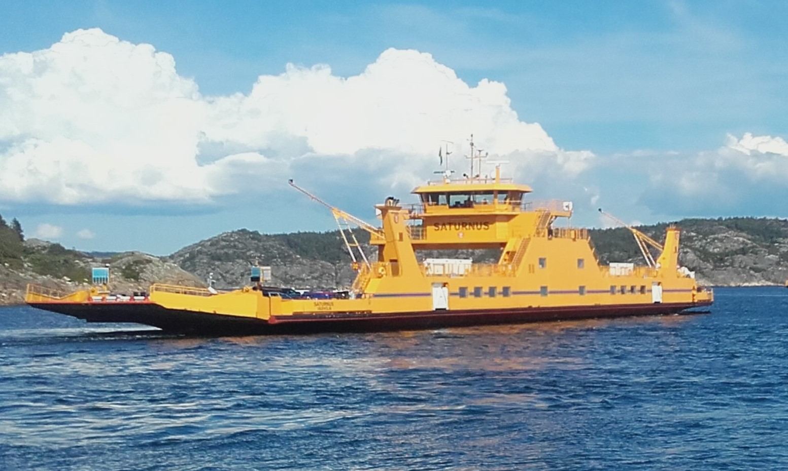 Vägfärjan Saturnus